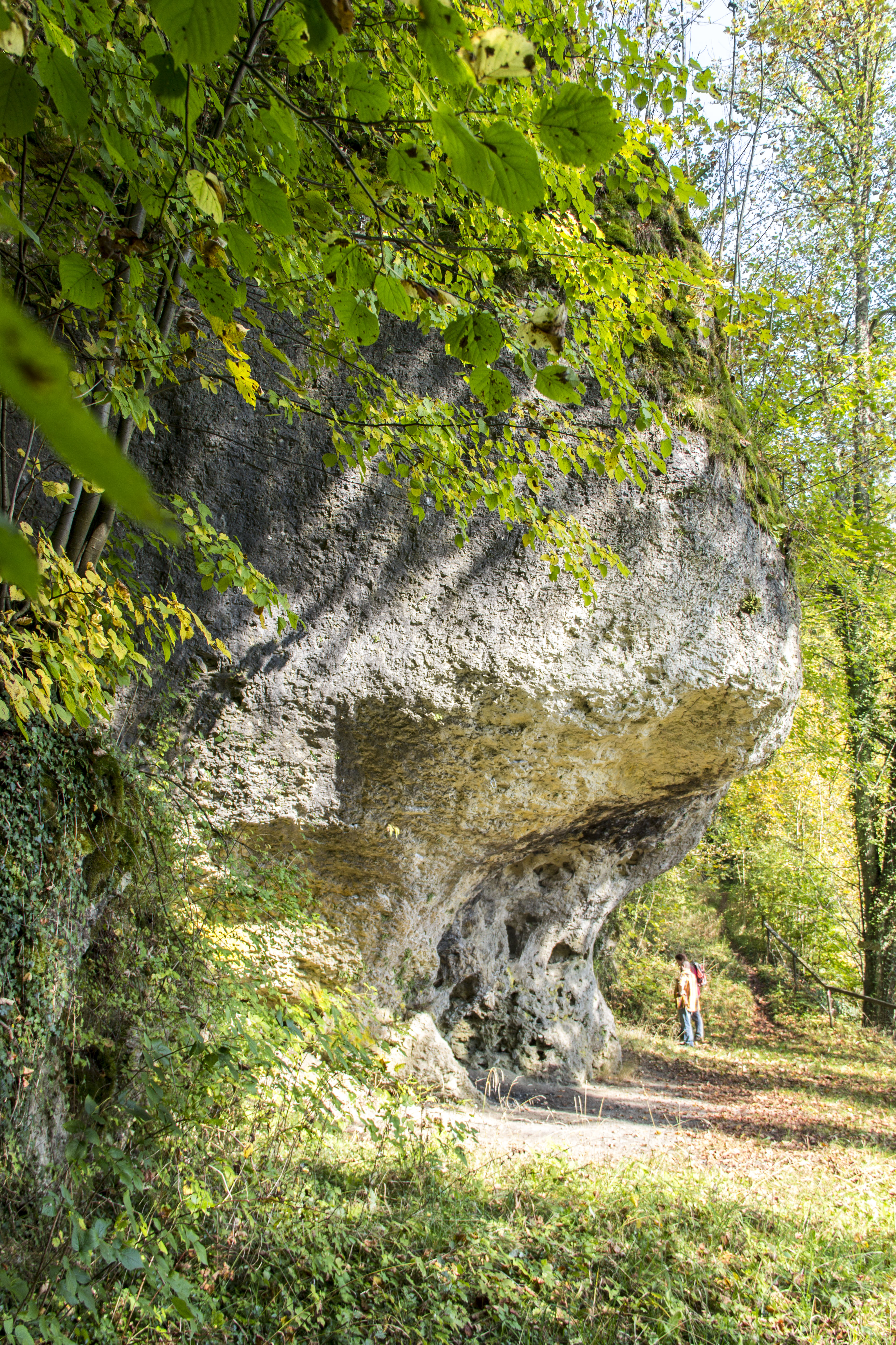 Felsen mit Schlossparkhöhle C23, Aufsess, Geotop, Naturdenkmal